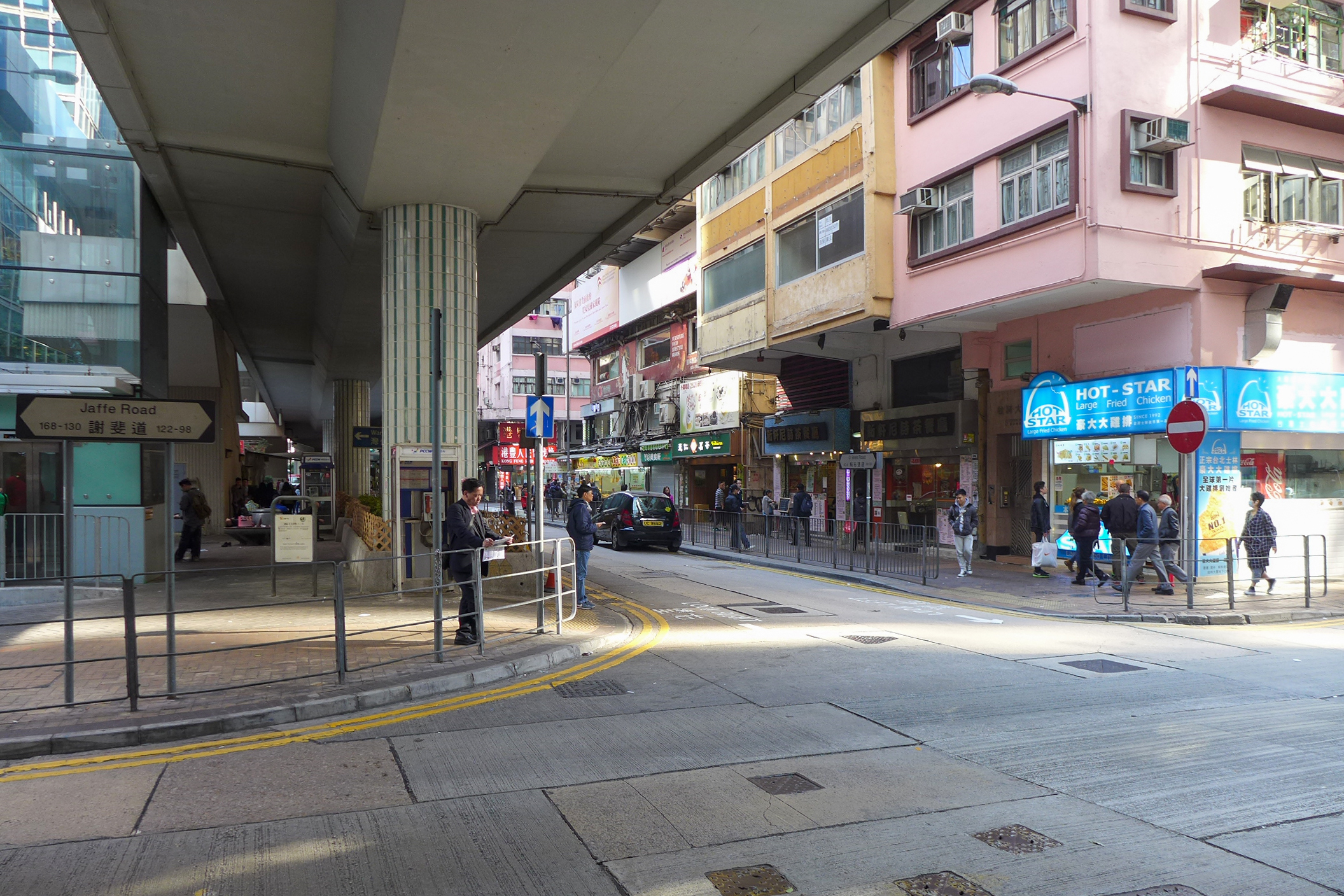 O'Brien Road